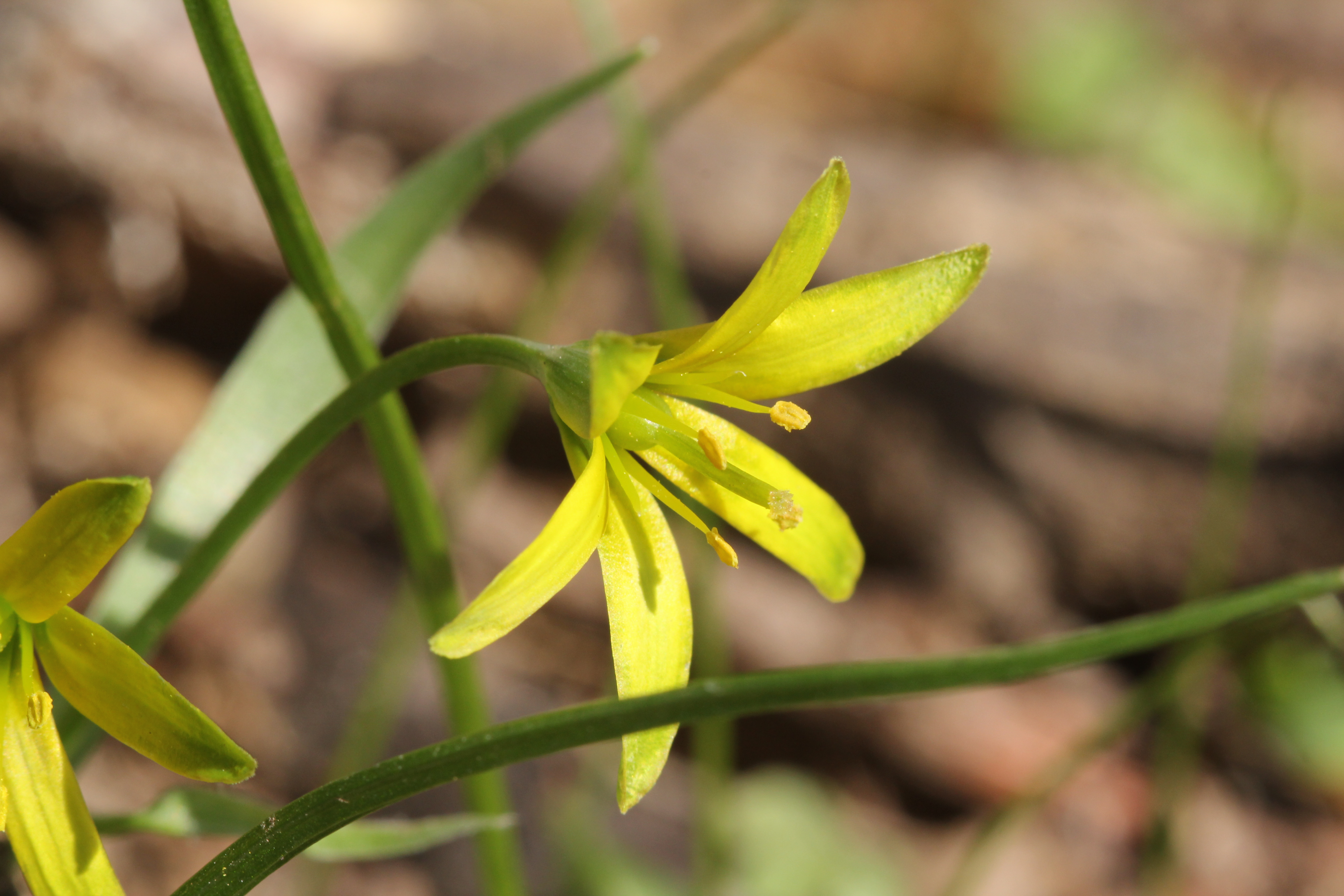 Myslivna (přírodní rezervace) - brzké jaro - Gagea lutea (L.) Ker-Gawler, křivatec žlutý - status ohrožení v ČR: není